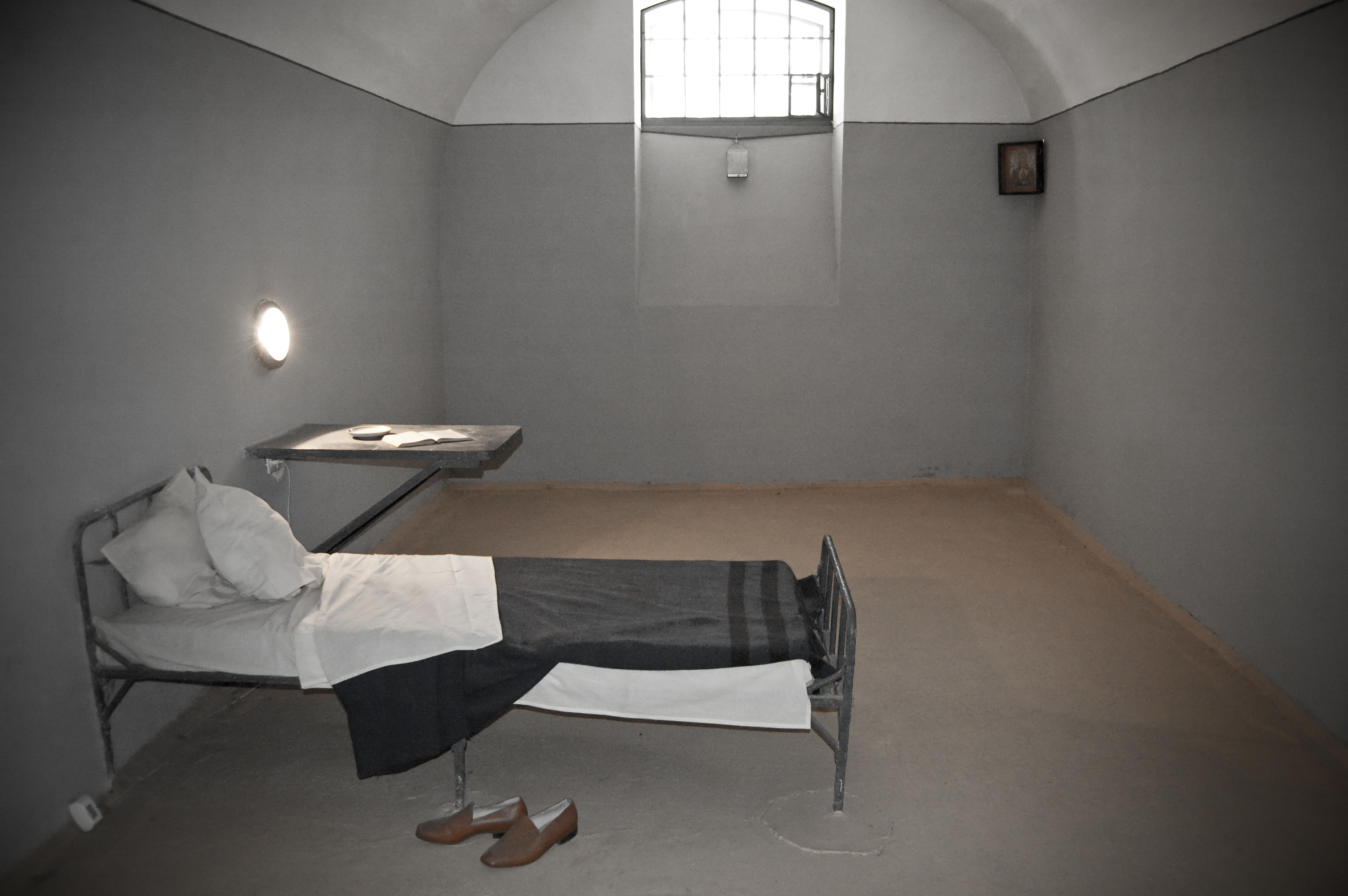 камера Тюрьмы Трубецкого бастиона